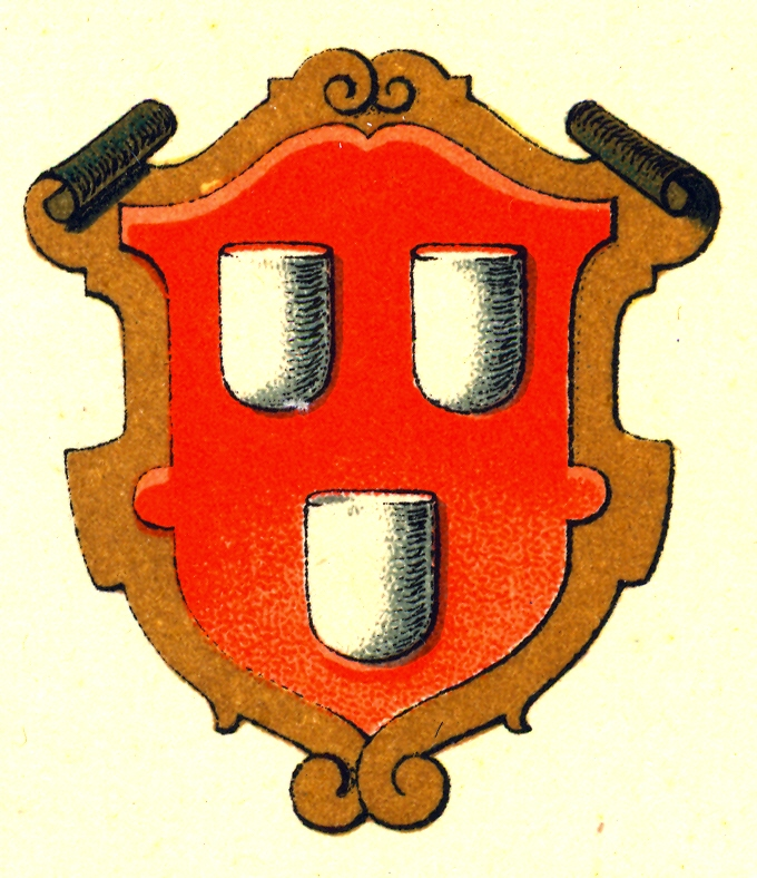 Zunftwappen Maler